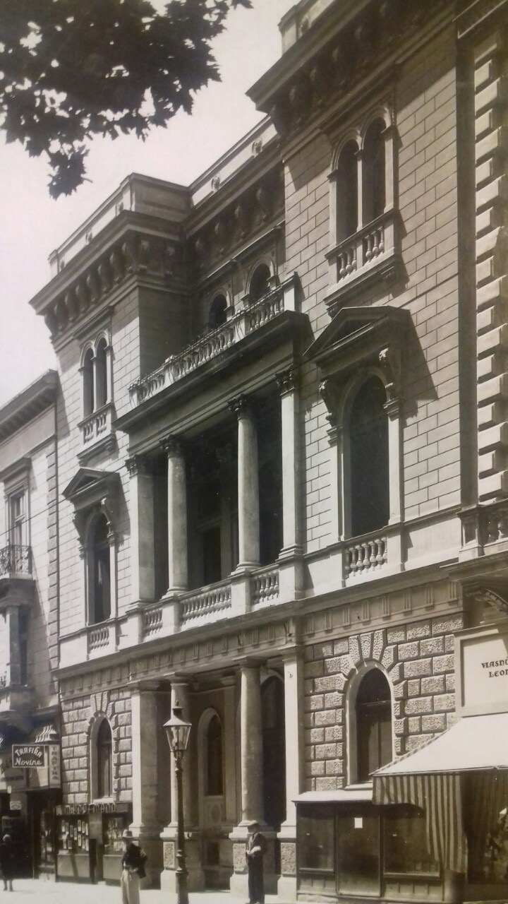 Zrinjevac 15, Zagreb